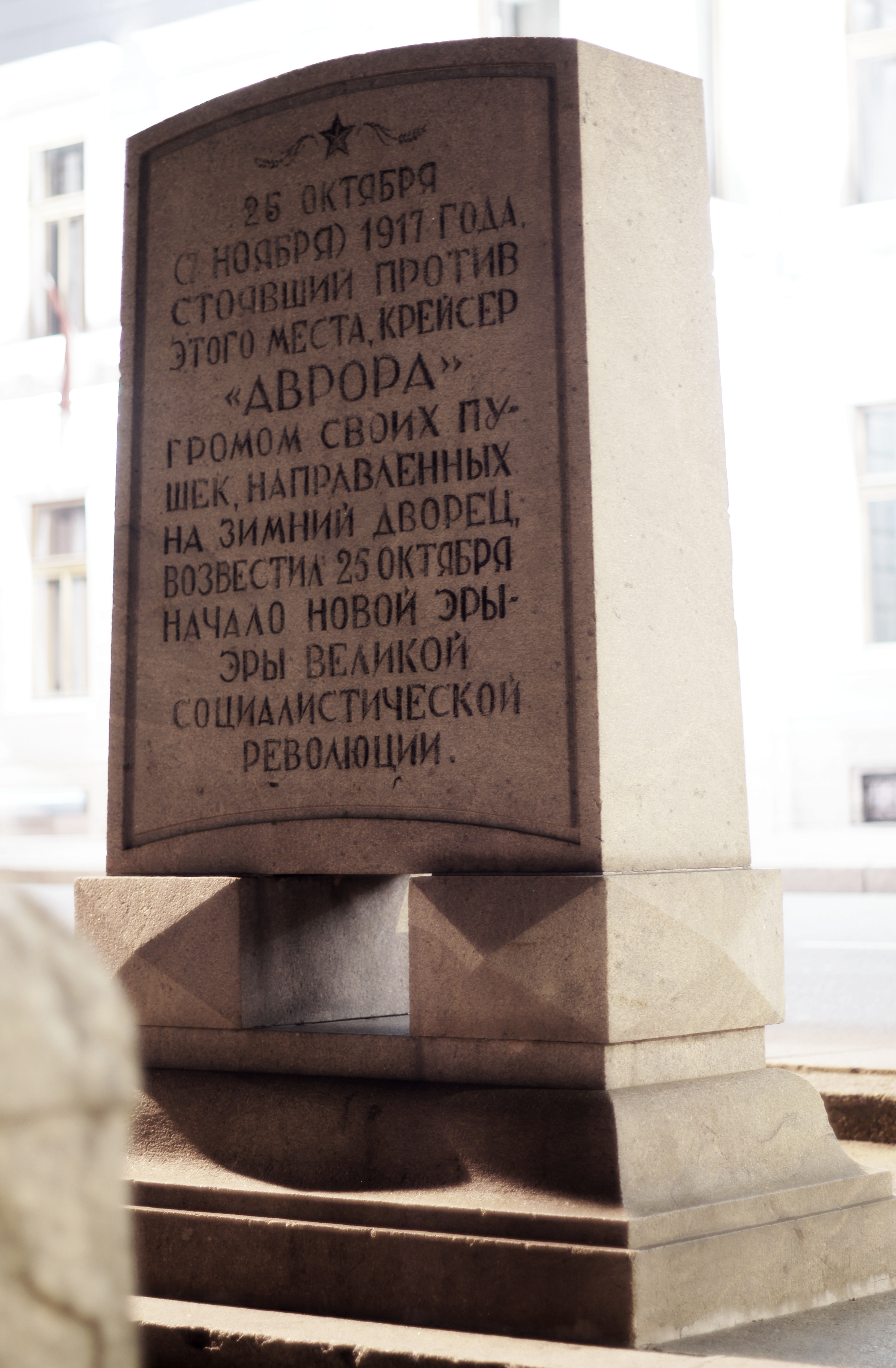 Стела в честь революционного крейсера Аврора: Английская набережная, у д.44, Адмиралтейский район, Санкт-Петербург